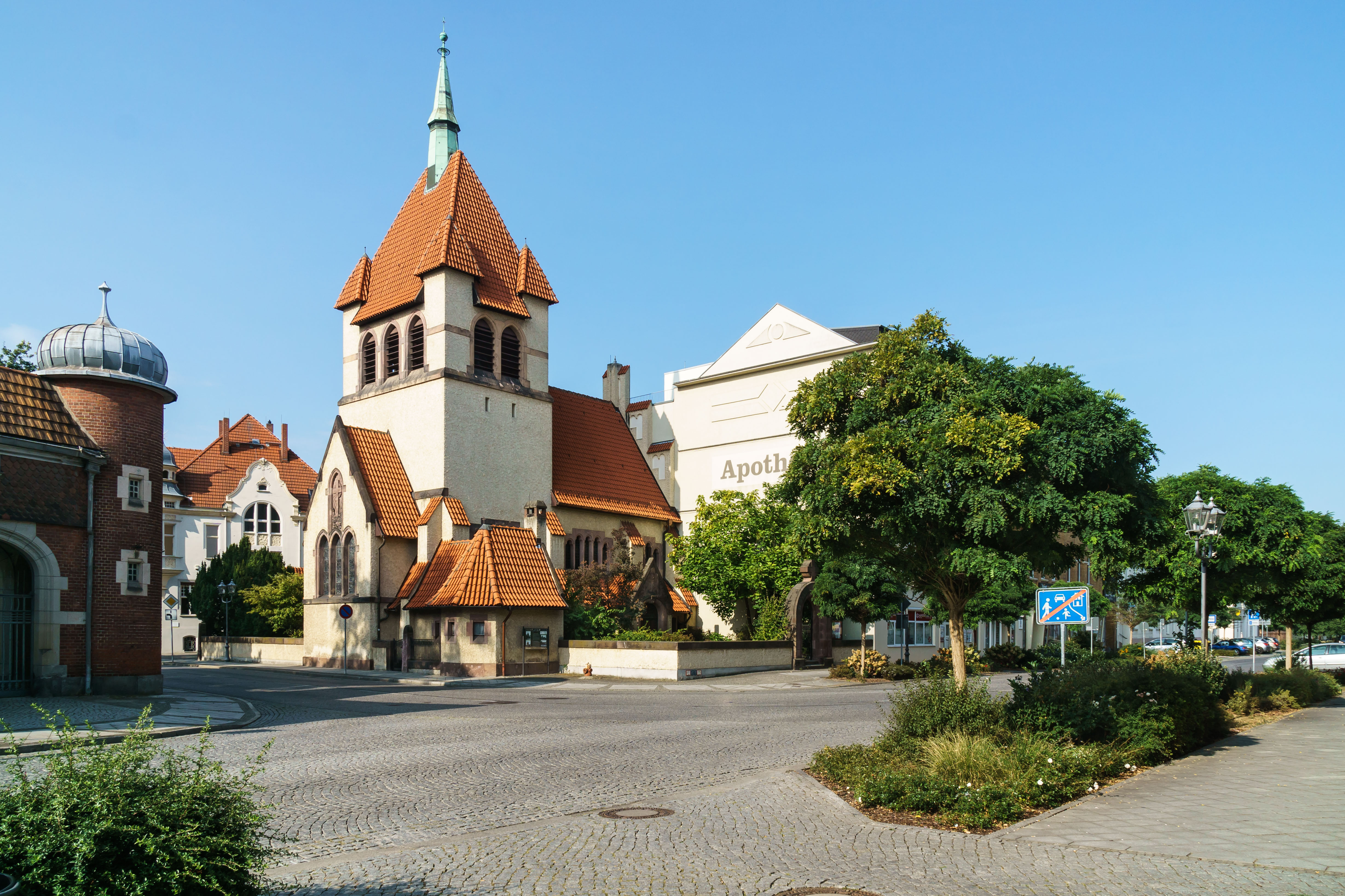 Kirche des guten Hirten, Straupitzstraße 1 in Guben